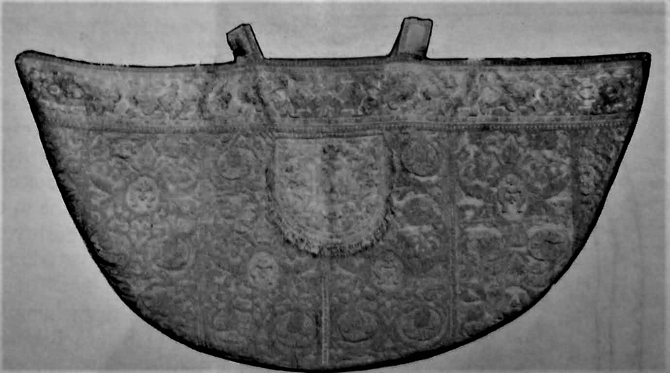 kapa z Piotrawina - zabytkowy ornat.